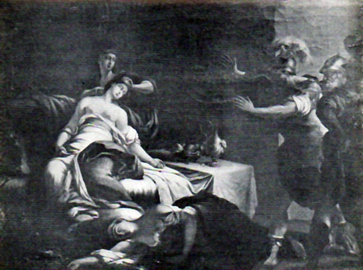 Moartea Cleopatrei, ulei, Muzeul Brukenthal di Sibiu, 37 x 46 cm, nesemnat, nedatat foto alb/negru